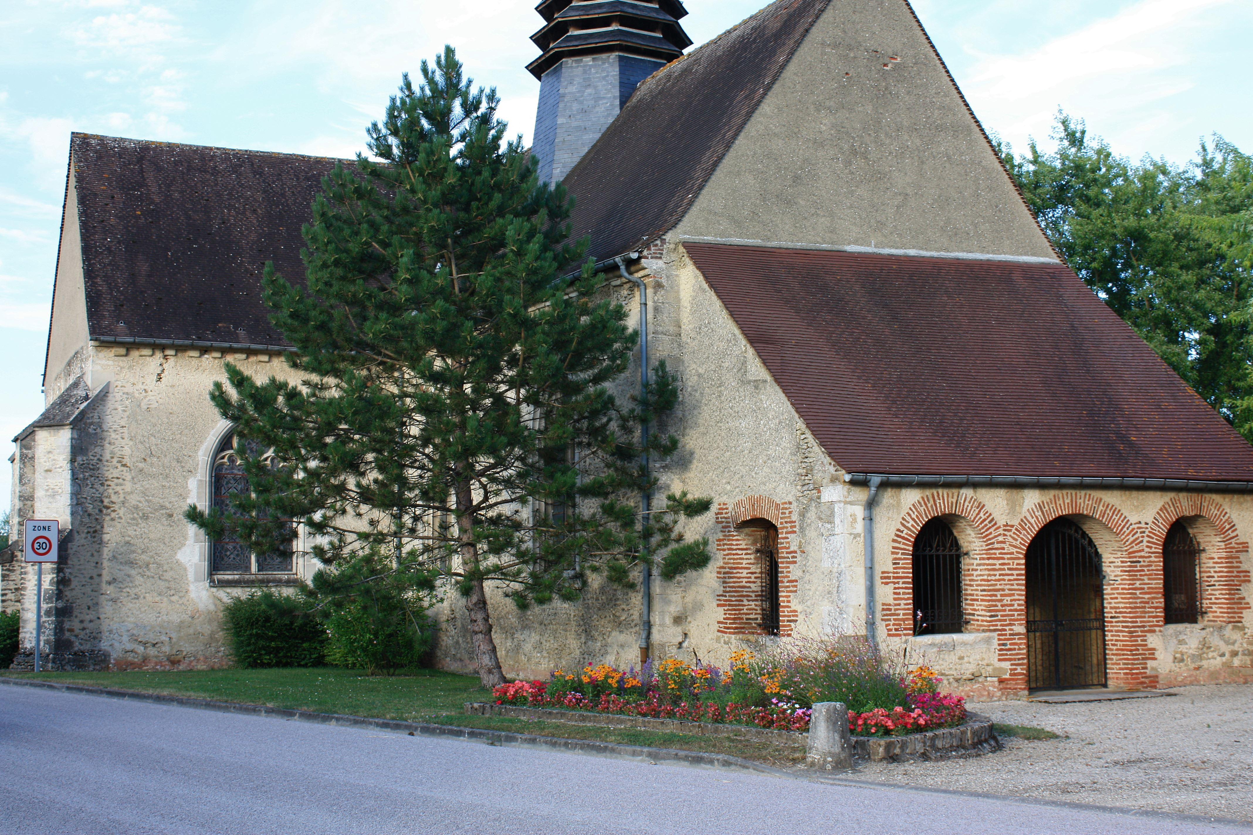 Vue générale au Nord-Ouest